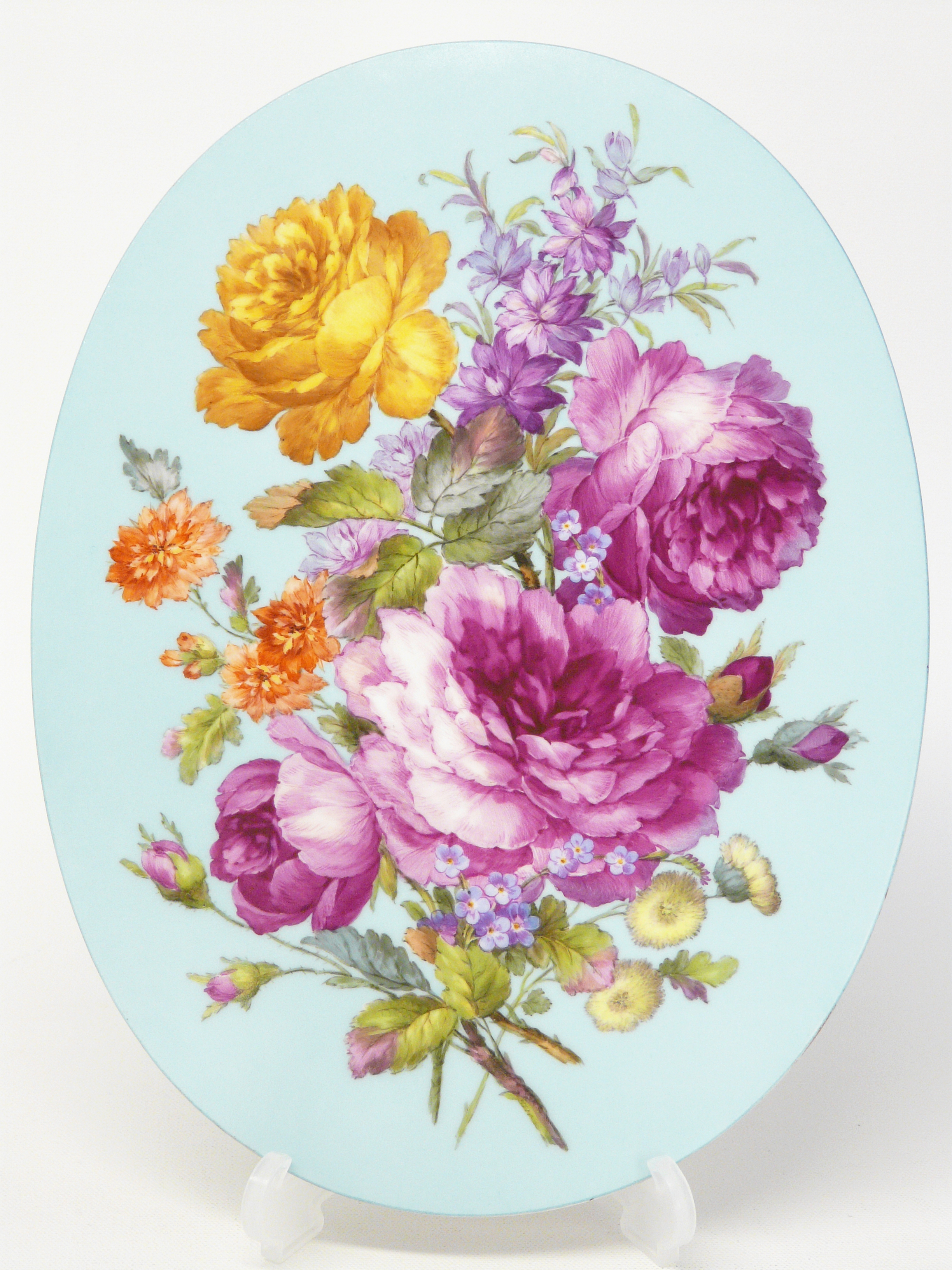 german flowersKPM Berlin, 1871-1943